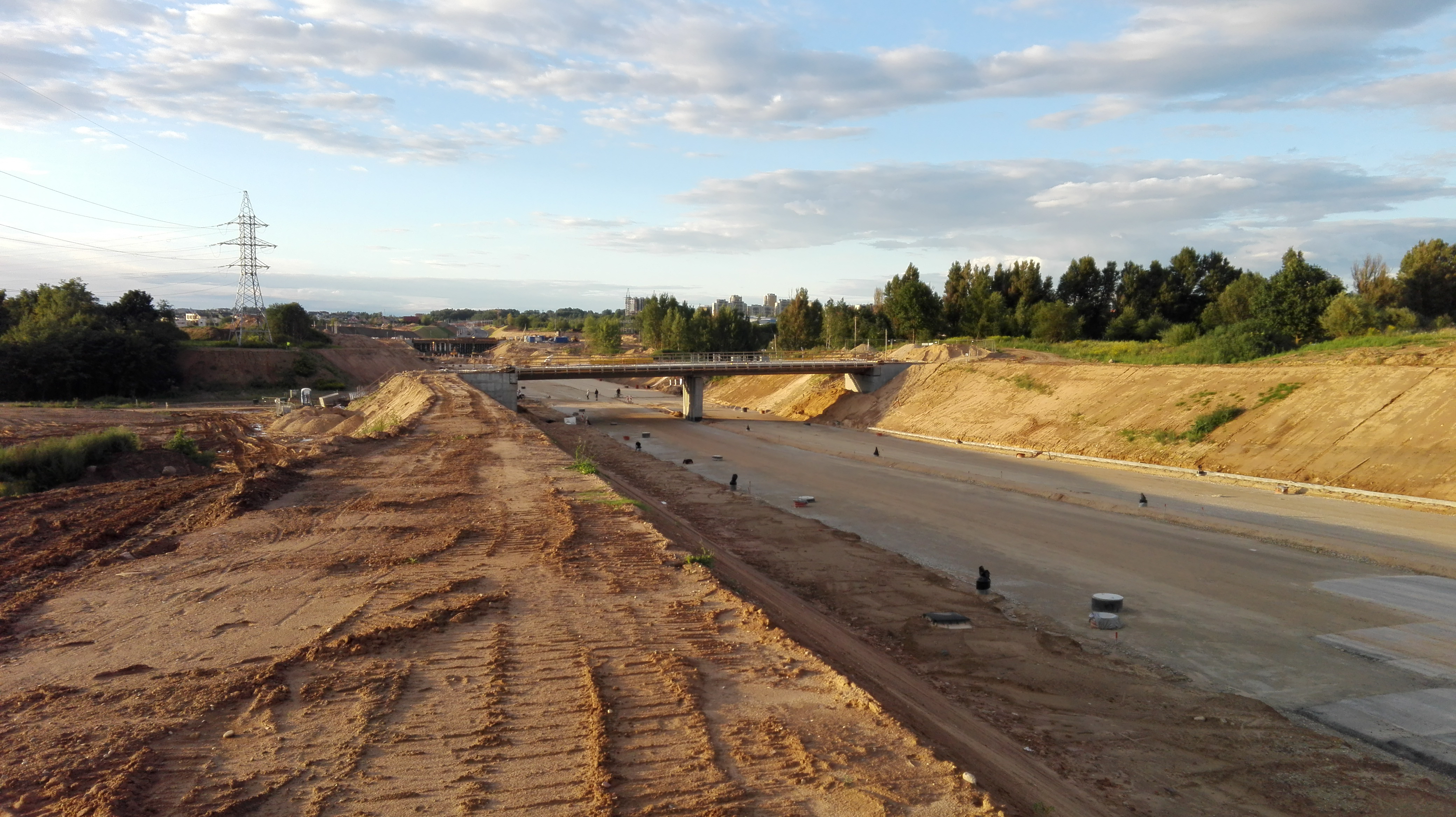 III Etapo tiesimo darbai